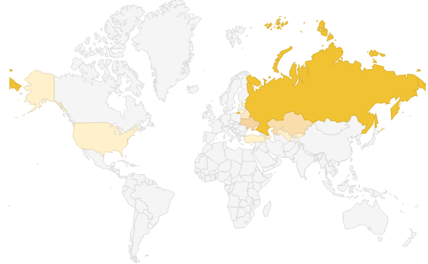 Популярность в мире